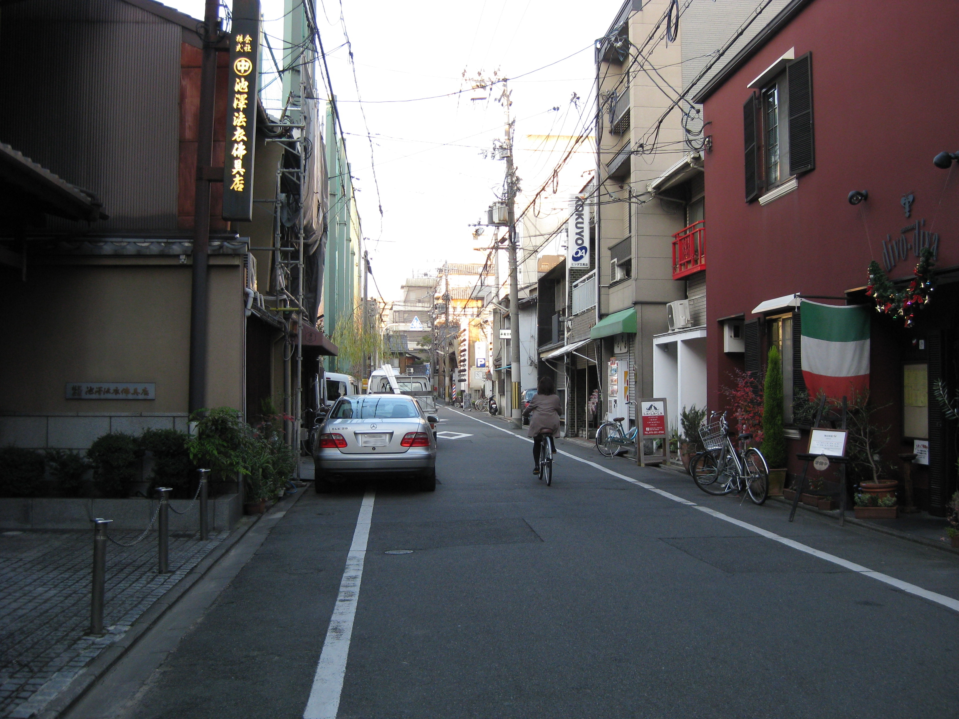 高倉通。蛸薬師通より北方向